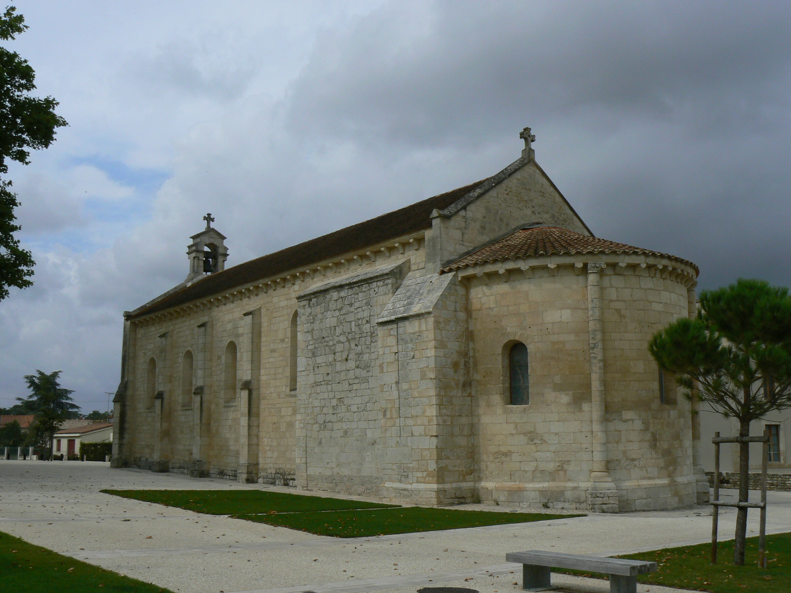 Église Saint-Pierre de Chauray, (Inscrit, 1991) .